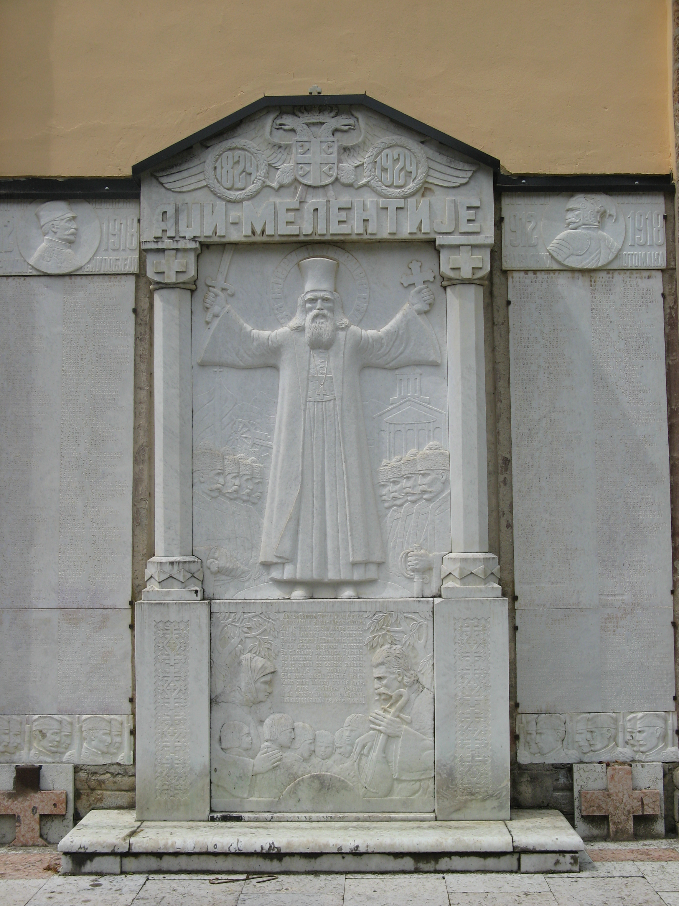 Манастир Рача